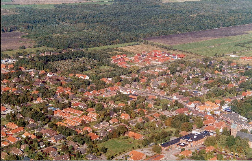 Hage Gesamtaufnahme01